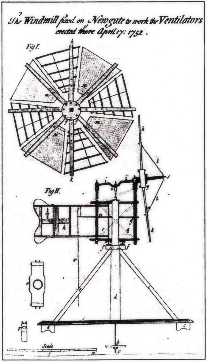 Hales’ Ventilationssytem im Gefängnis Newgate